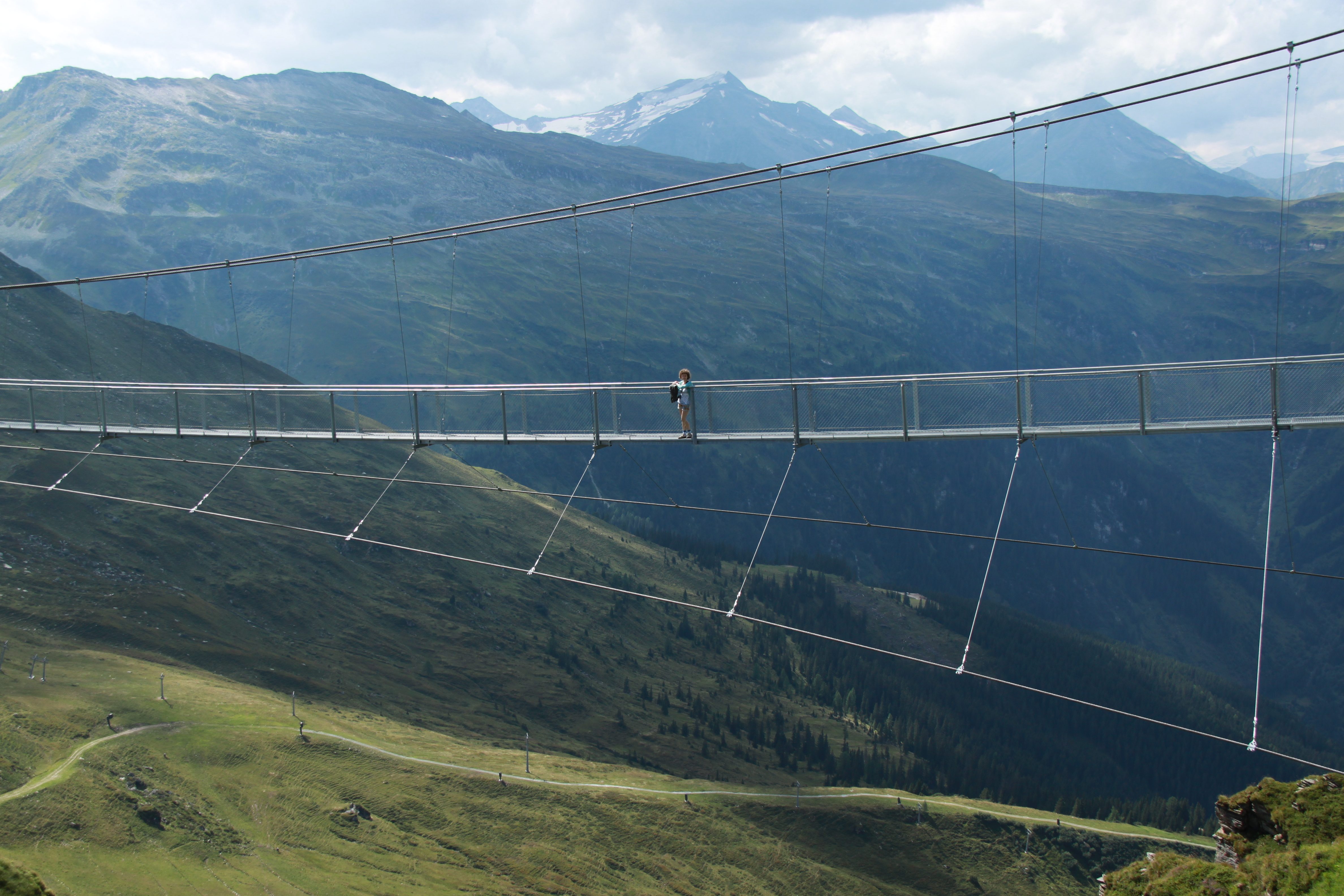 Stubnerkogel - Bad Gastein - Austria - August 2010